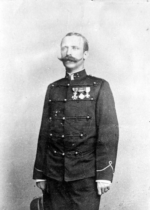 Negatief. Portret van kapitein Klaas van der Maaten